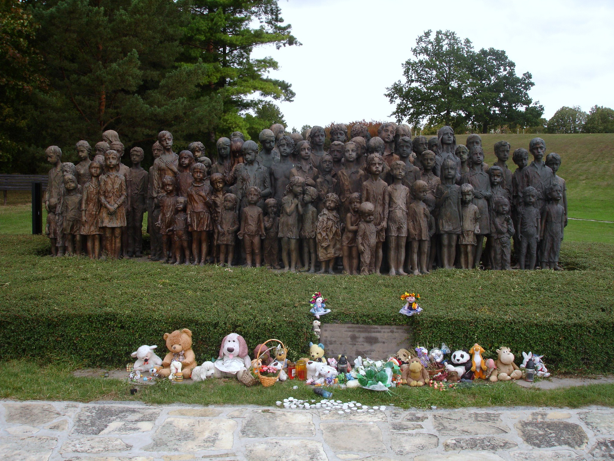 Monumento a los niños de Lidice.